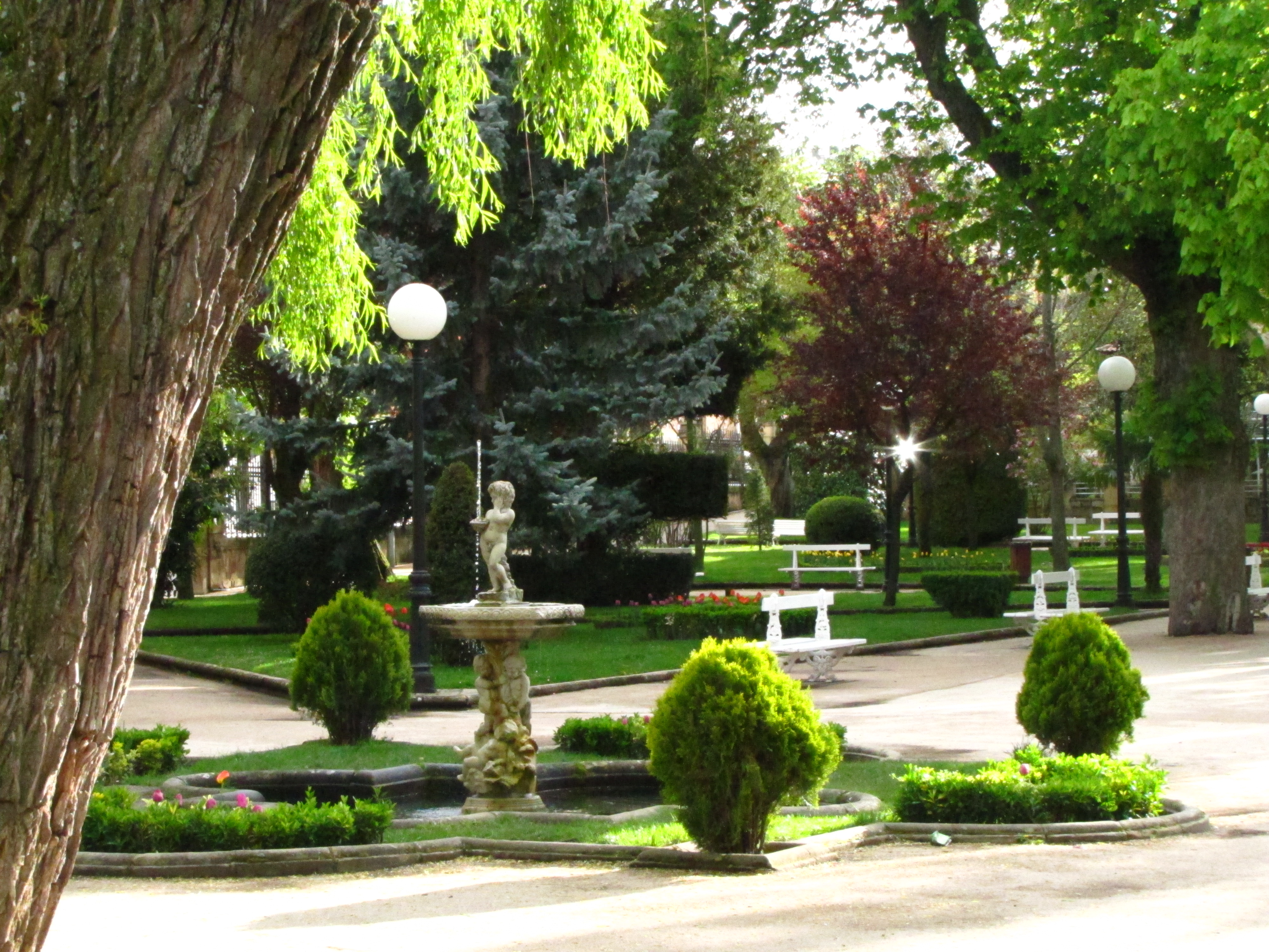 Fuente del Niño en la Alameda de cervantes (Soria).